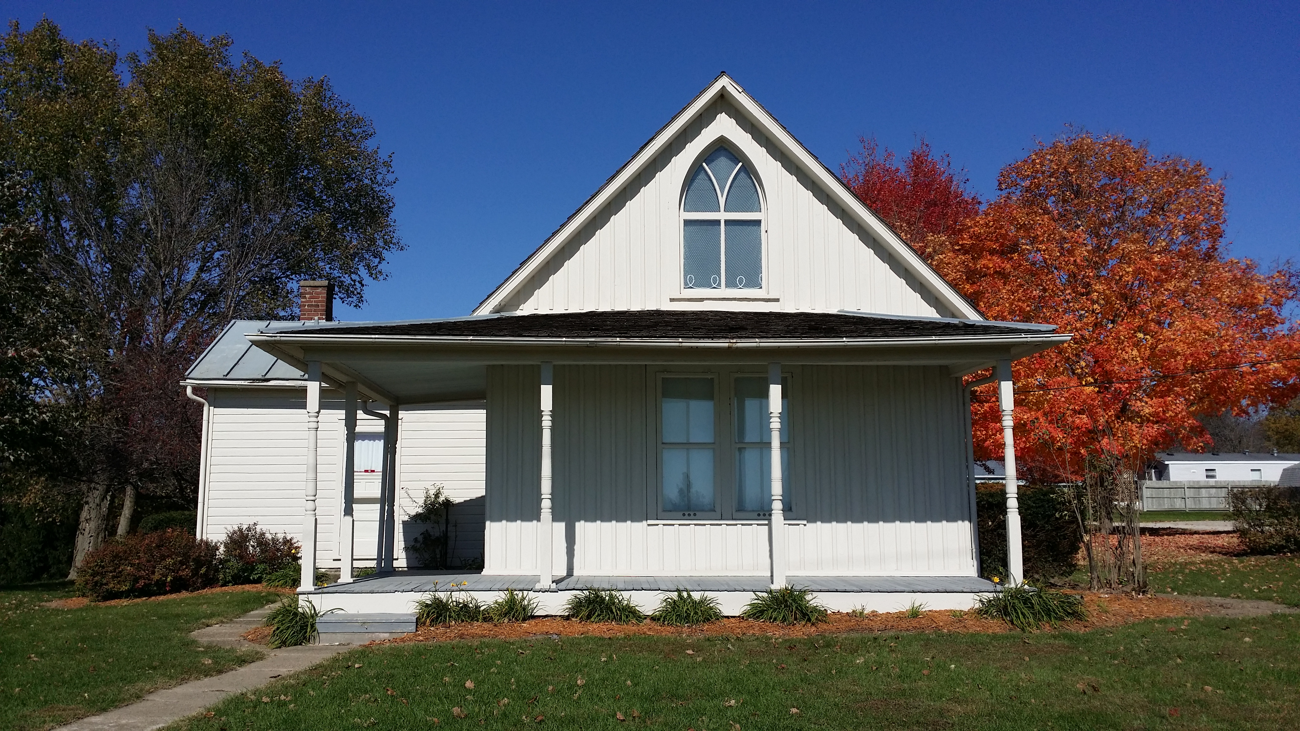 Eldon, IA 52554, USA